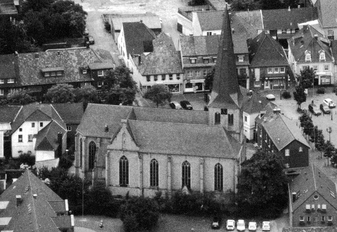 Luftaufnahme Laurentiuskirche, Grefrath, Markt 8 This image shows a heritage building in Germany, located in the North Rhine-Westphalian city Grefrath (no. Gr 20).